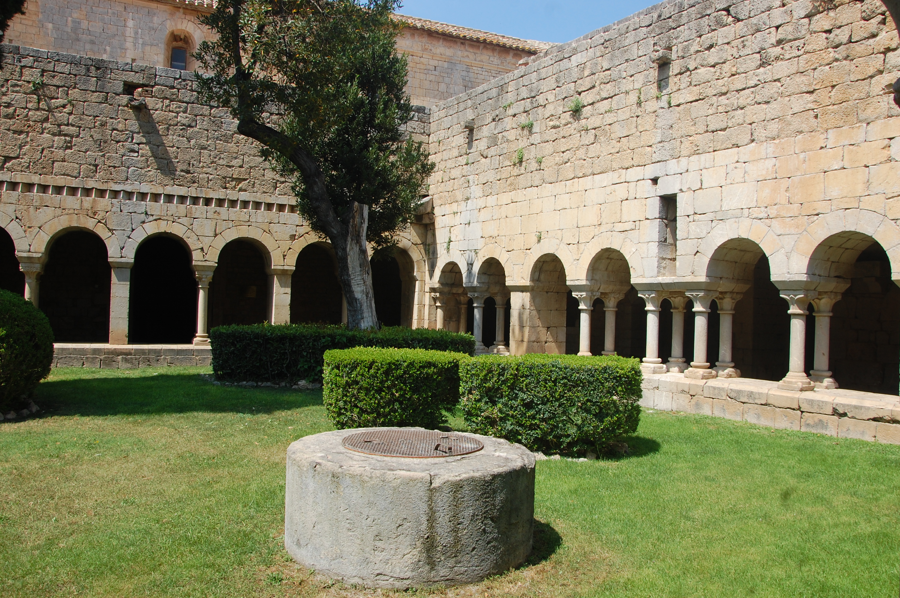 Claustro del monestir de Vilabertran.